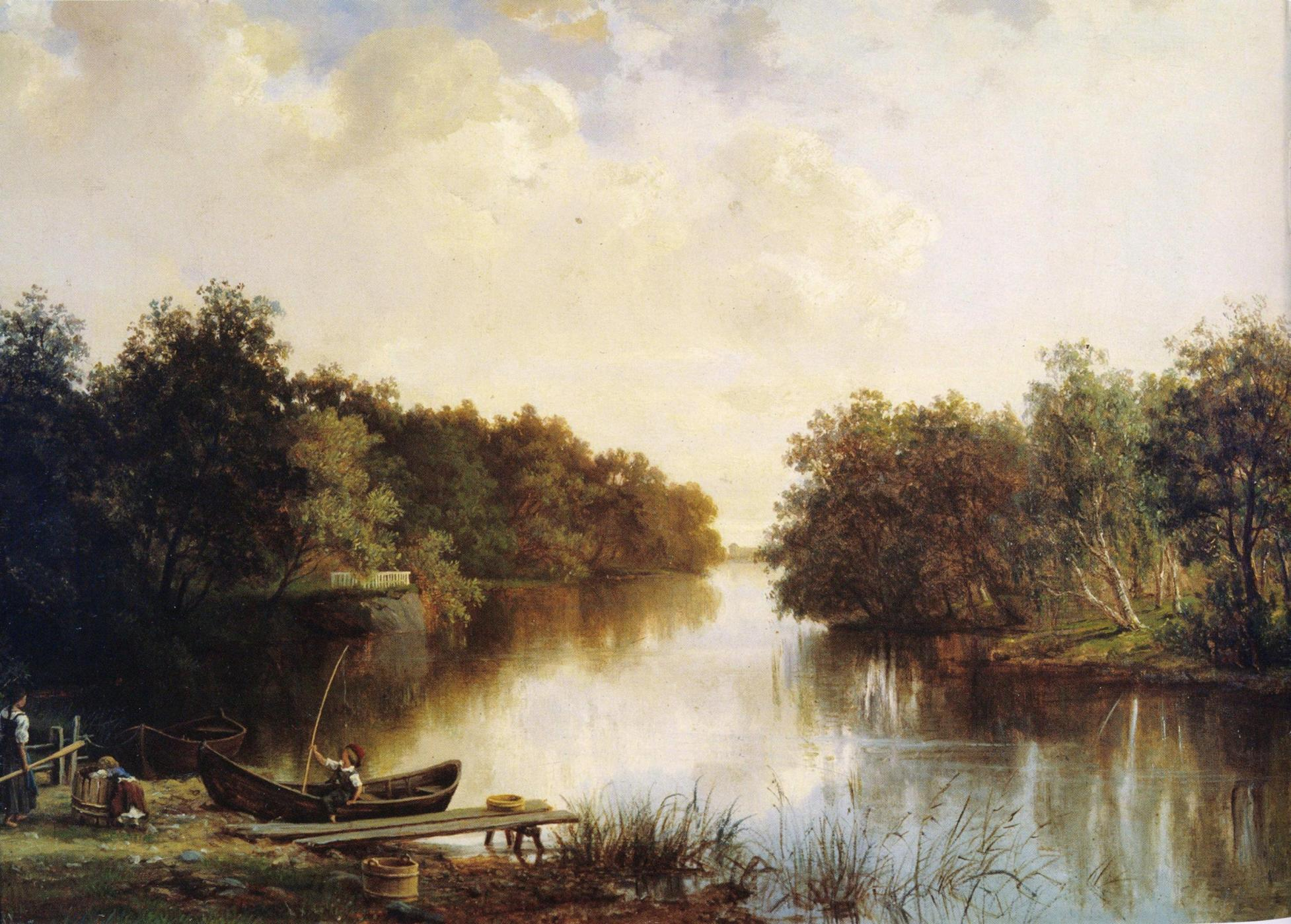 Emma Gyldénin maisemamaalaus.